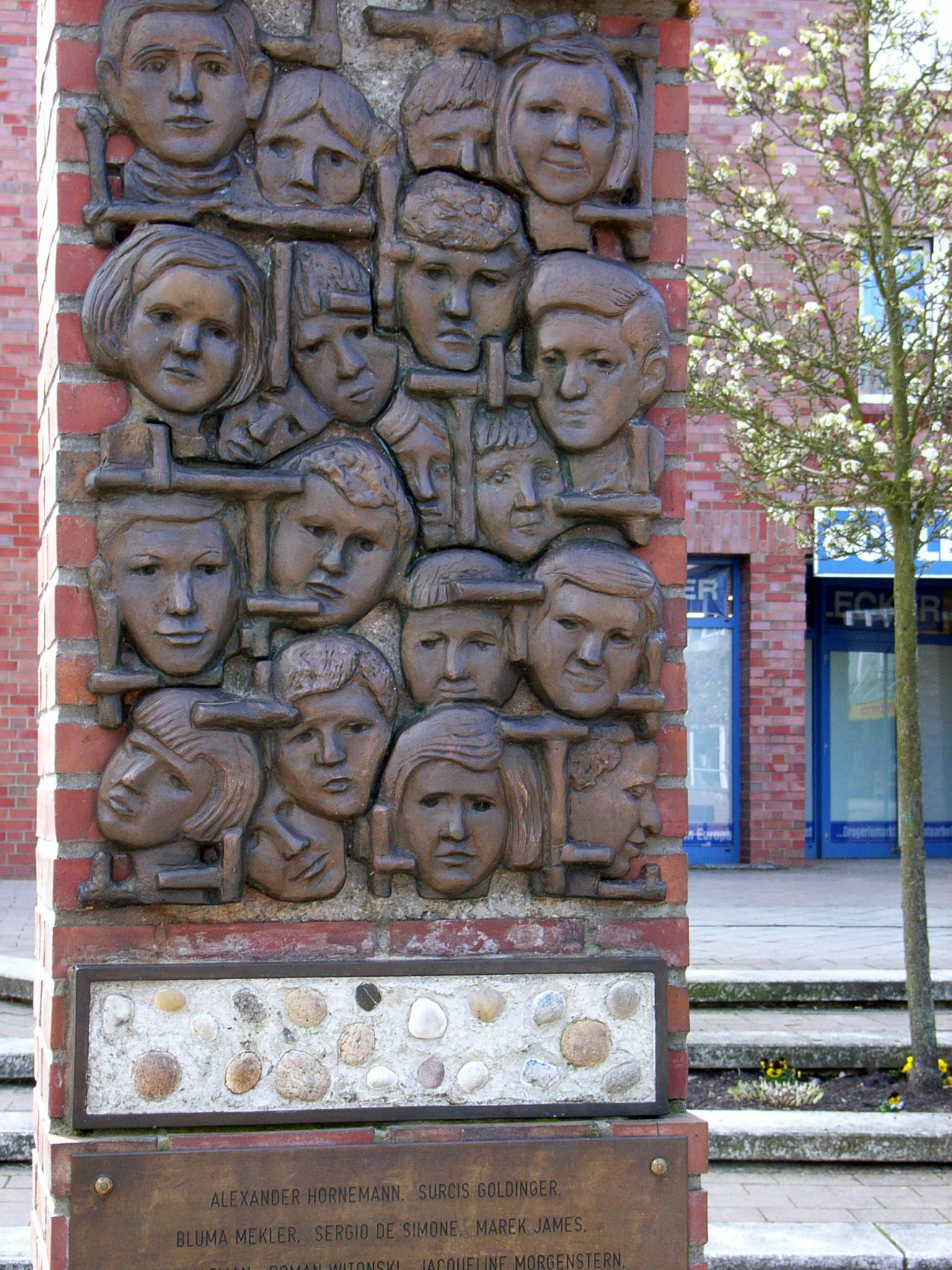 Mahnmal Hamburg-Schnelsen für die Kinder vom Bullenhuser Damm. Unterhalb des Reliefs sind die Namen der Kinder aufgeführt. Auf der Rückseite trägt die Stele die Inschrift: Den Kindern vom Bullenhuser Damm und ihren Betreuern Nach Folter im KZ ermordet am 20. April 1945 Straßen und Plätze erinnern an sie hier Eine Initiative der Bürgerinnen und Bürger Mit ihren Spenden errichtet 2001